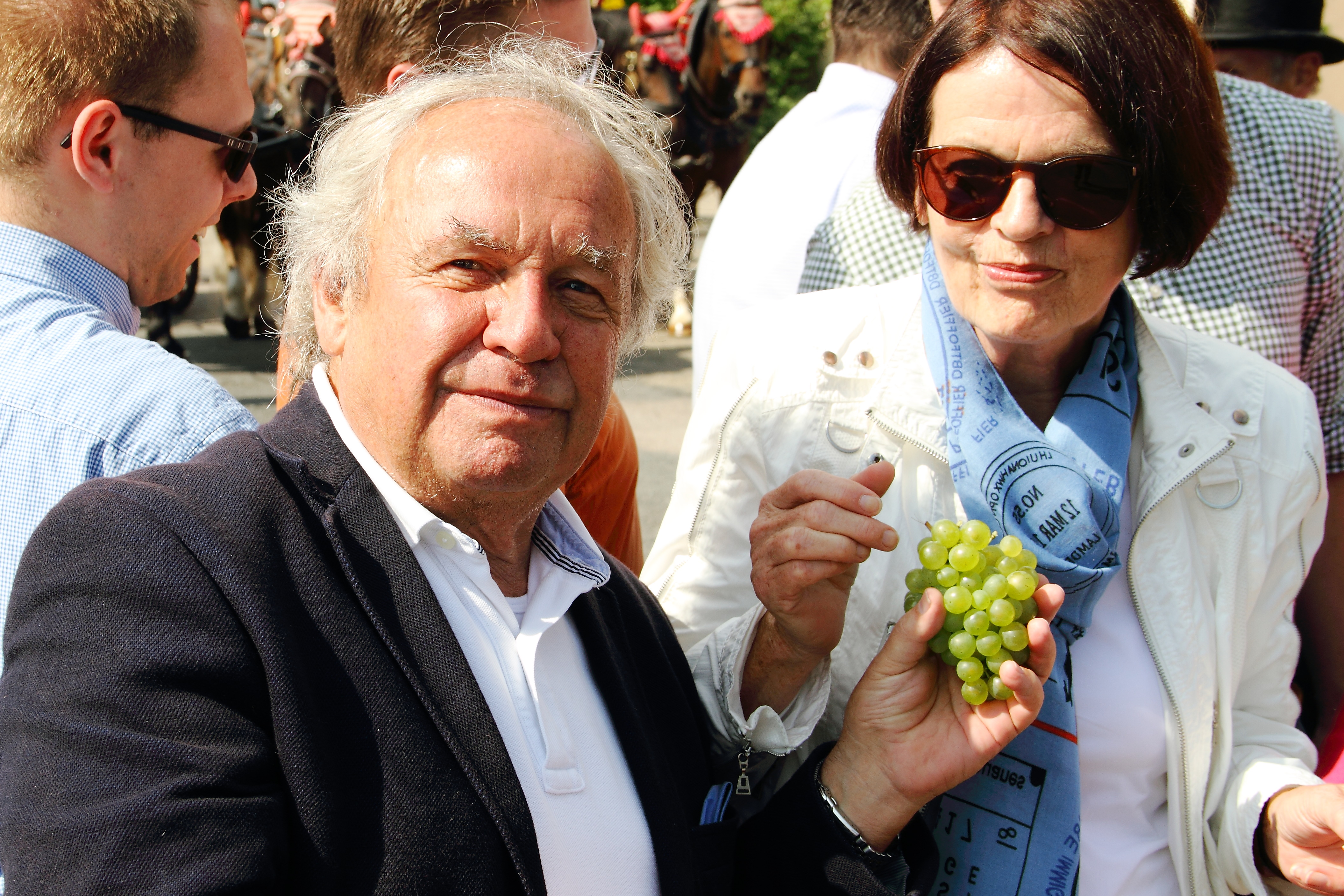 Der ehemalige Landrat des Main-Tauber-Kreises Georg Denzer als Ehrengast auf dem Festzug der Weikersheimer Kärwe 2017.